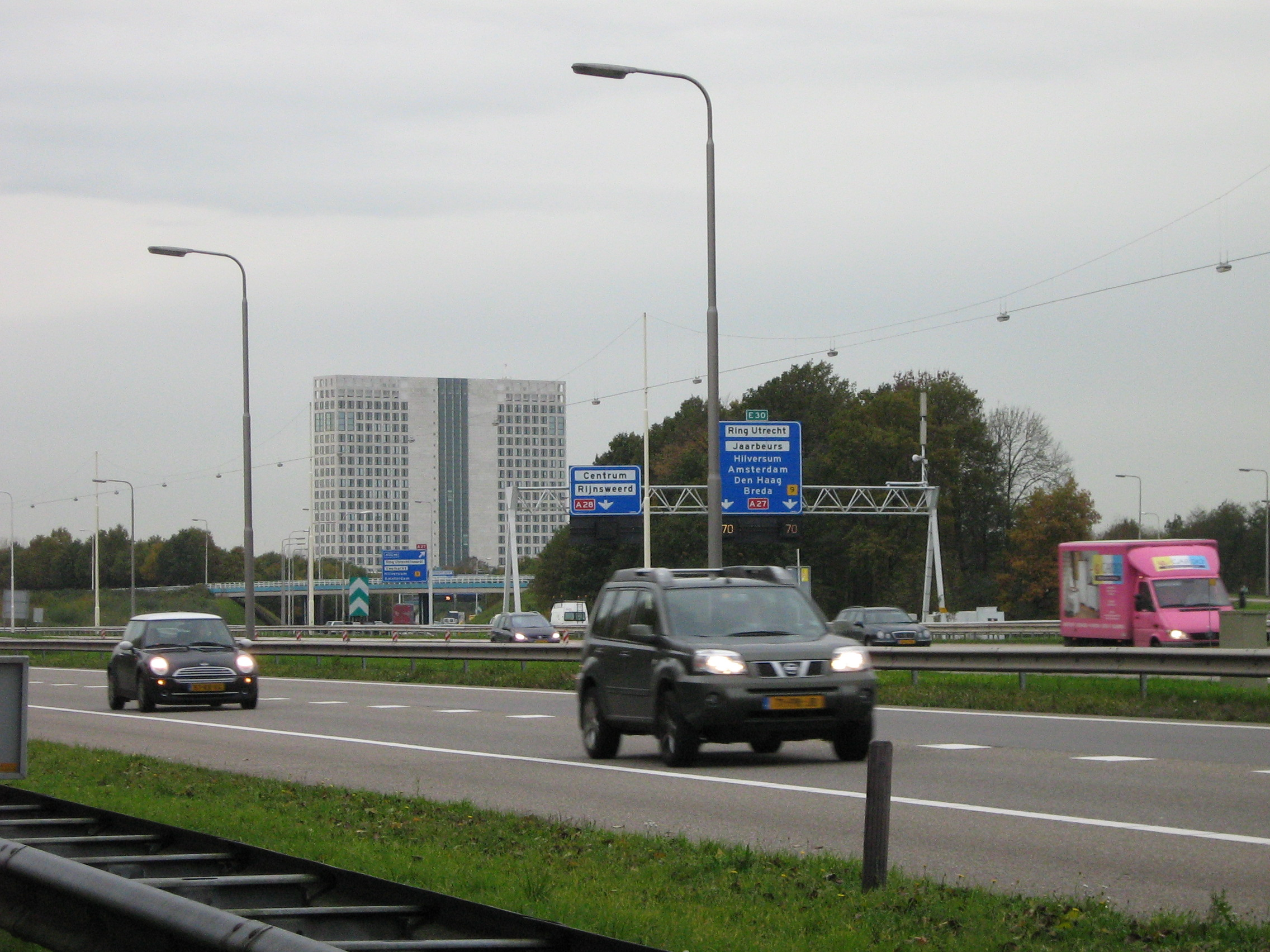 Rond Utrecht